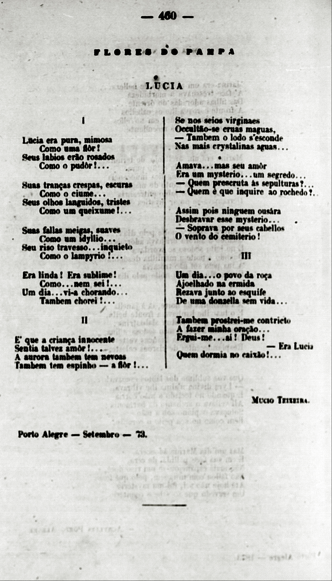 Poema Lucia, de Múcio Teixeira